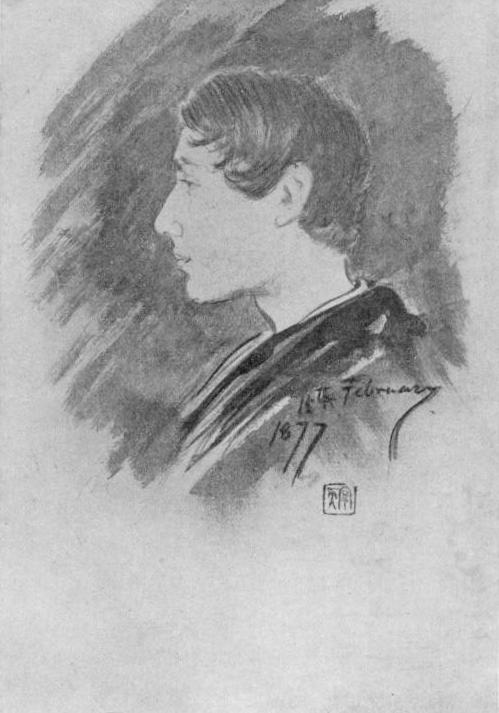 কিশোর রবীন্দ্রনাথ ঠাকুর, ১৮৭৭ খ্রিষ্টাব্দ। জ্যোতিরিন্দ্রনাথ ঠাকুরের স্কেচ অবলম্বনে গগনেন্দ্রনাথ ঠাকুর অঙ্কিত চিত্র। সূত্র: রবিজীবনী (প্রথম খণ্ড), প্রশান্তকুমার পাল, আনন্দ পাবলিশার্স প্রাইভেট লিমিটেড, কলকাতা.